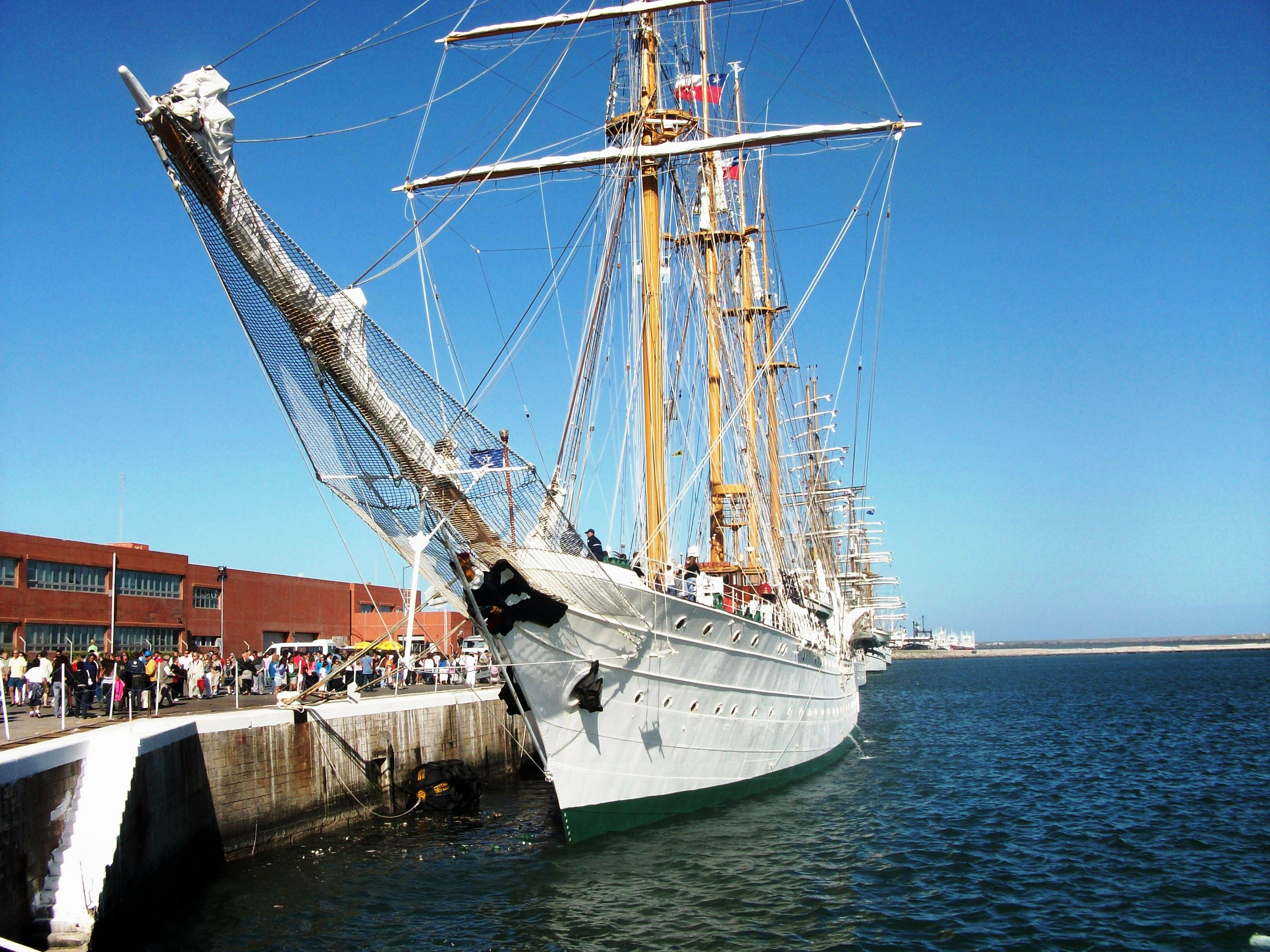 Tall ship BE-43 Esmeralda at dock in Mar del Plata, Argentina